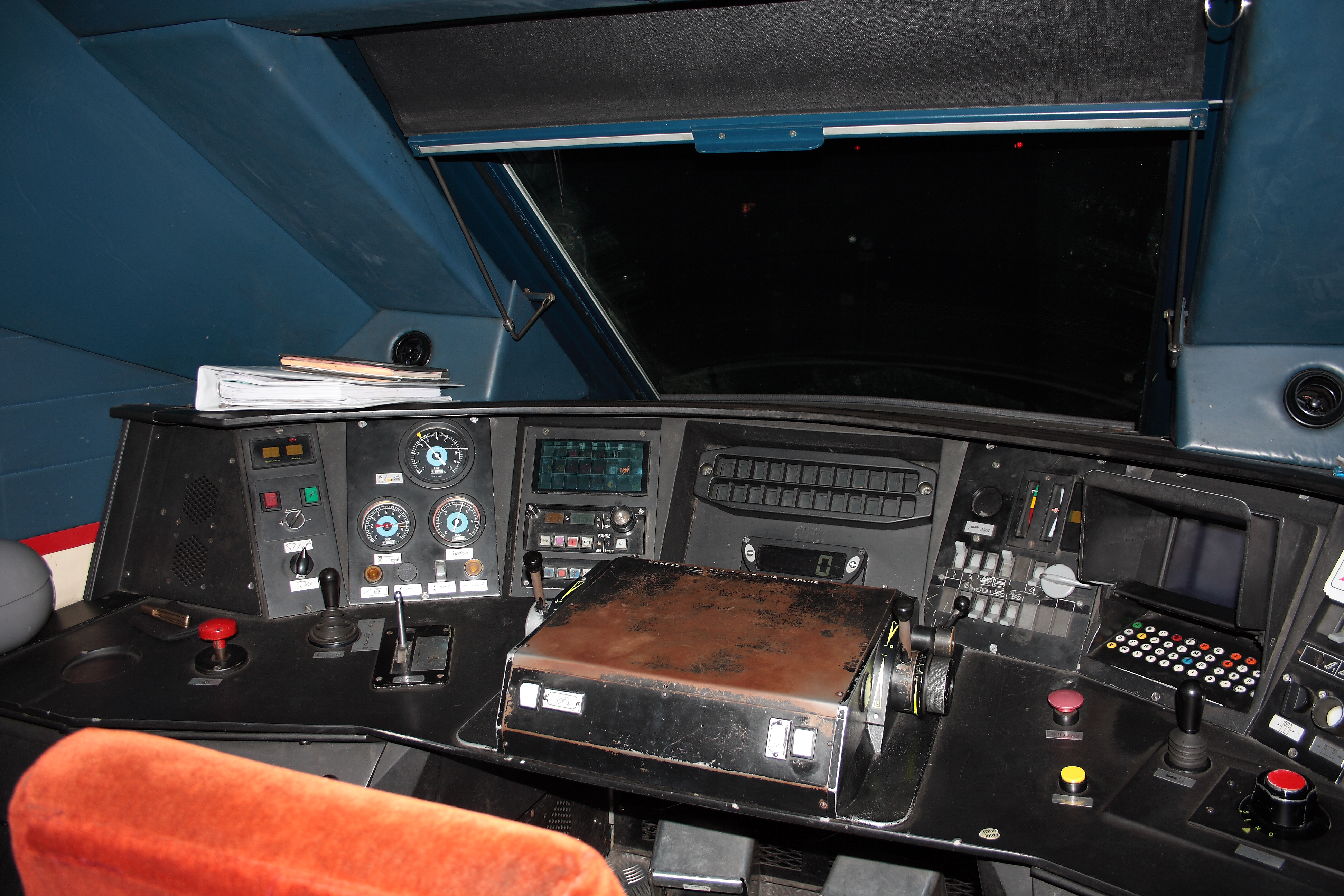 Pupitre d'un TGV TMST « North of London ».